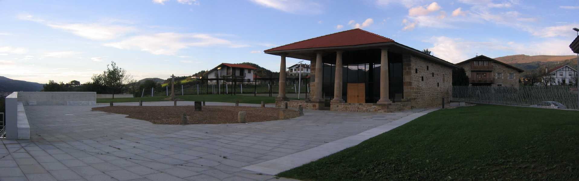 Campa Foral de Gerediaga en su estado actual (2005). Conjunto Juradero de Gerediaga en Abadiño, Bizkaia, Euskal Herria, se ve la ermita de San Salvador y San Clemente, las 12 piedras que representan a los doce asientos, uno para cada anteiglesia (municipio) que tenía derecho a voz y voto, el crucero y el roble (recuperado). Después de su última restauración en Octubre de 2005.